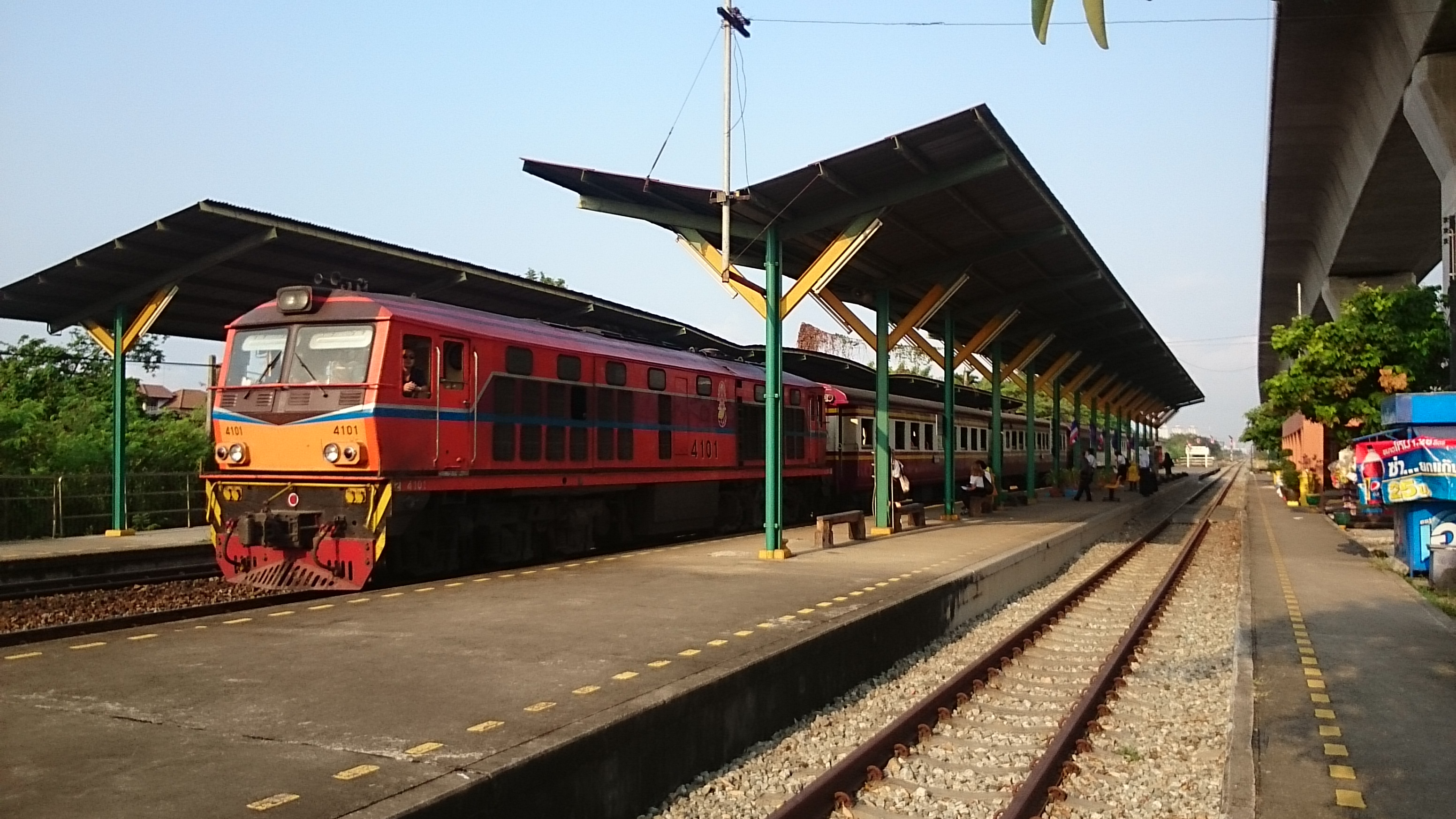 右上の高架はエアポートリンクレイル。